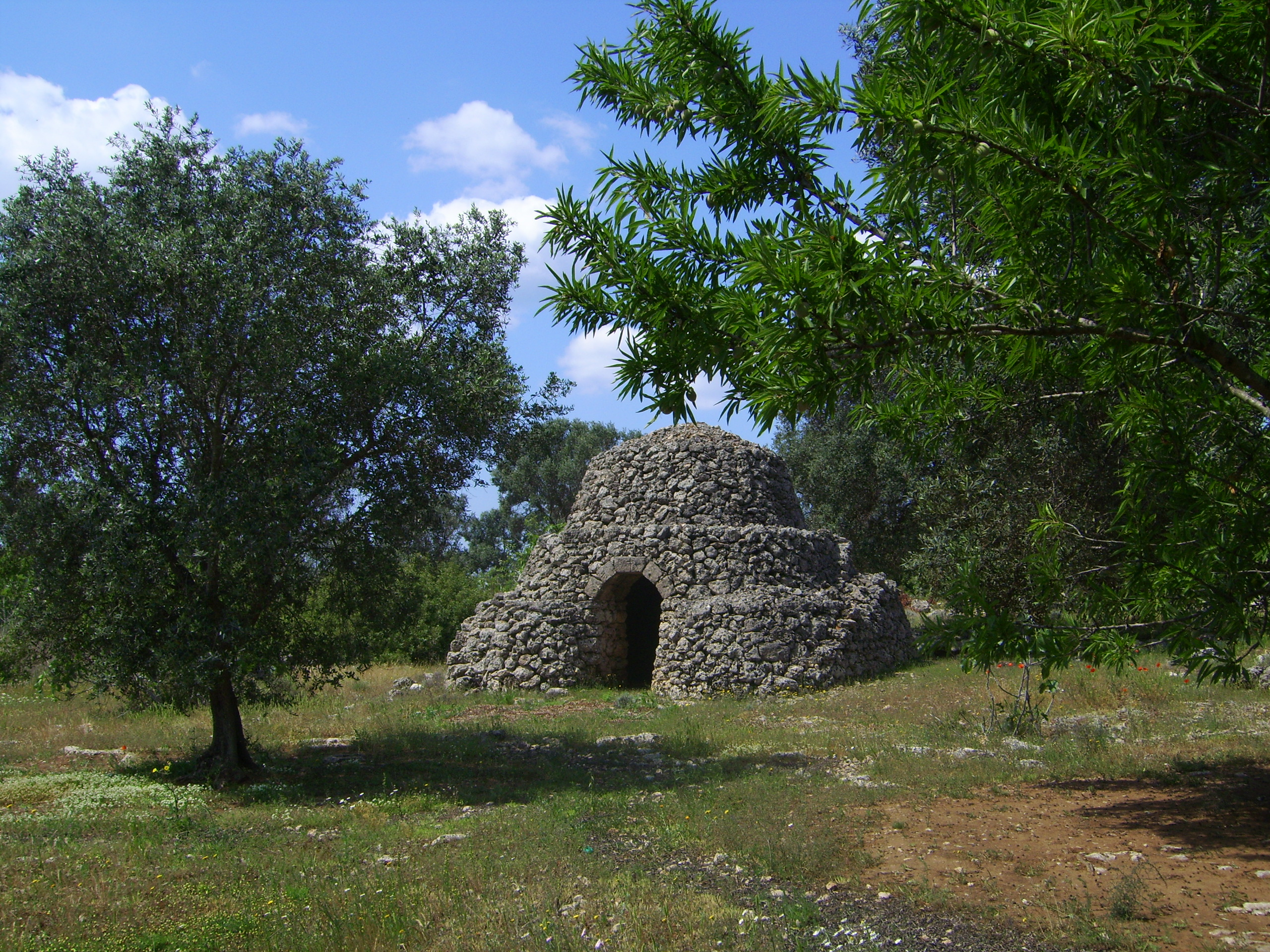 Pagghiara salentina